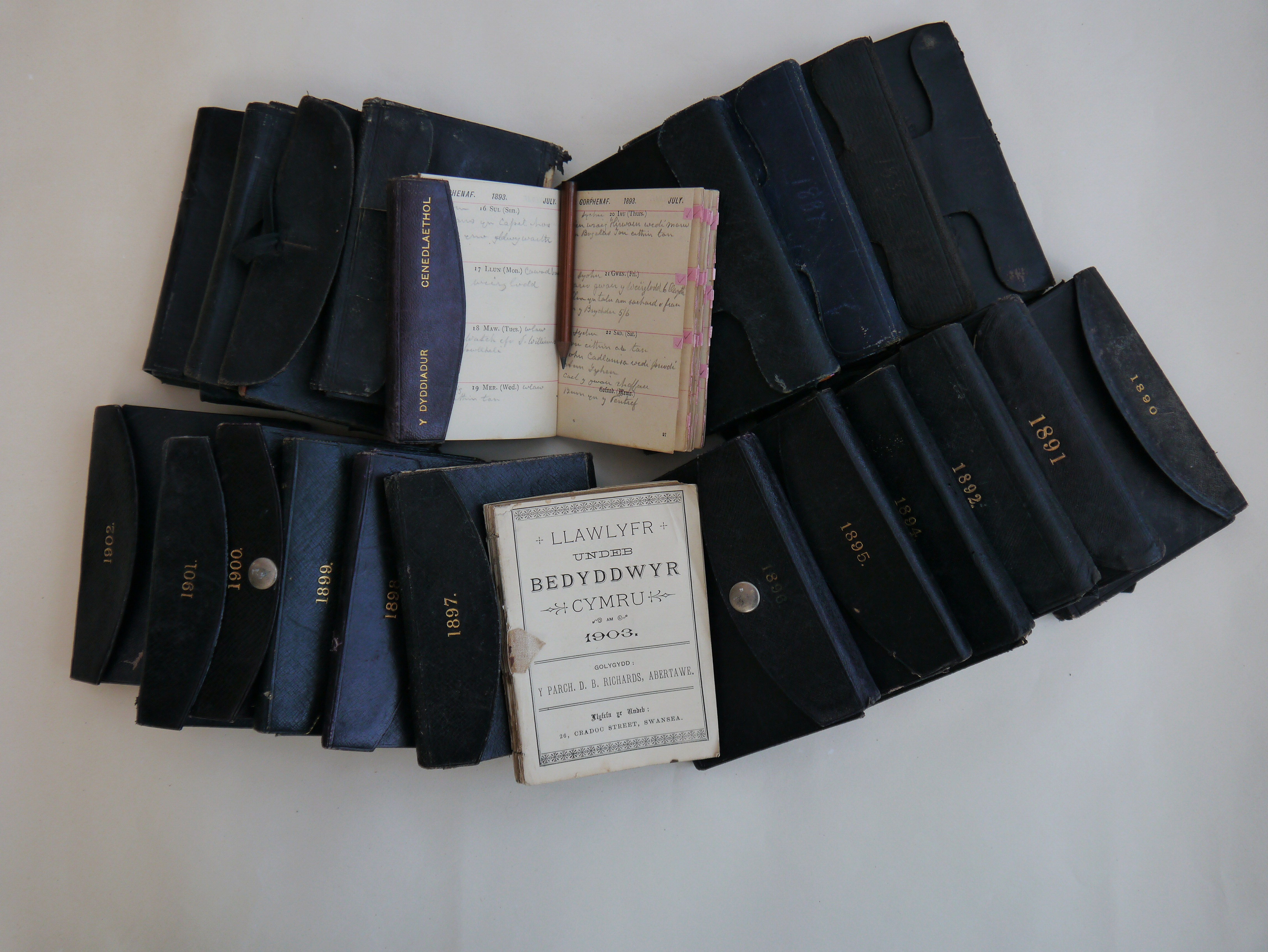 Dyddiaduron William Joness, Moelfre